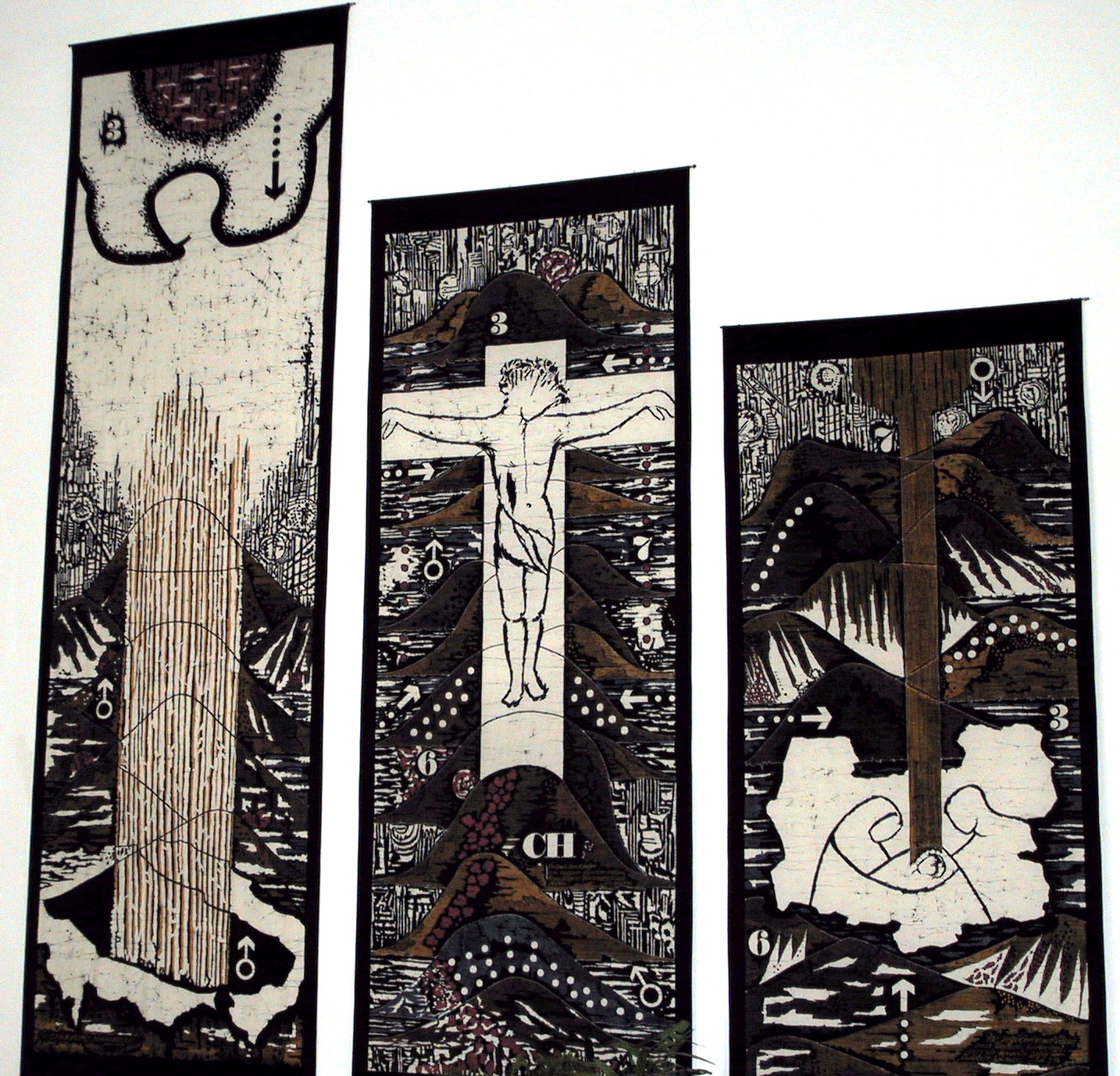 SCHALOM-Haus, Wandbehänge